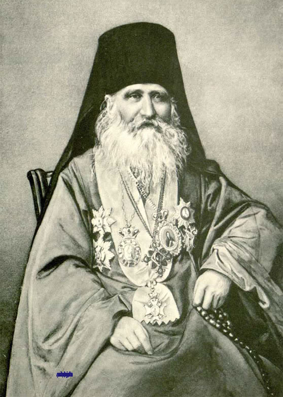 Митрополит Михаил (Йованович)